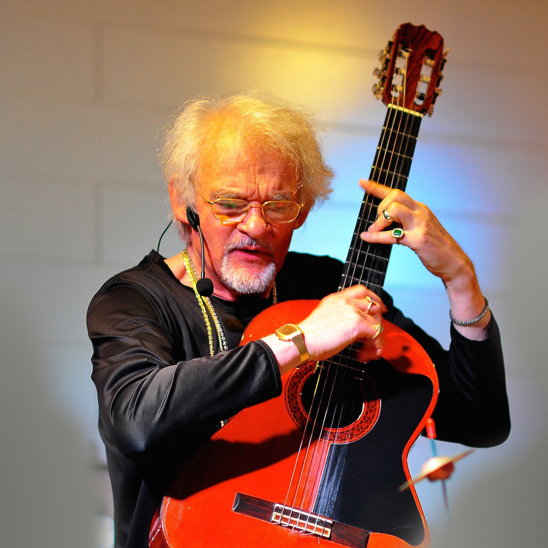 Ingo Insterburg live in Alsdorf (Westerwald)